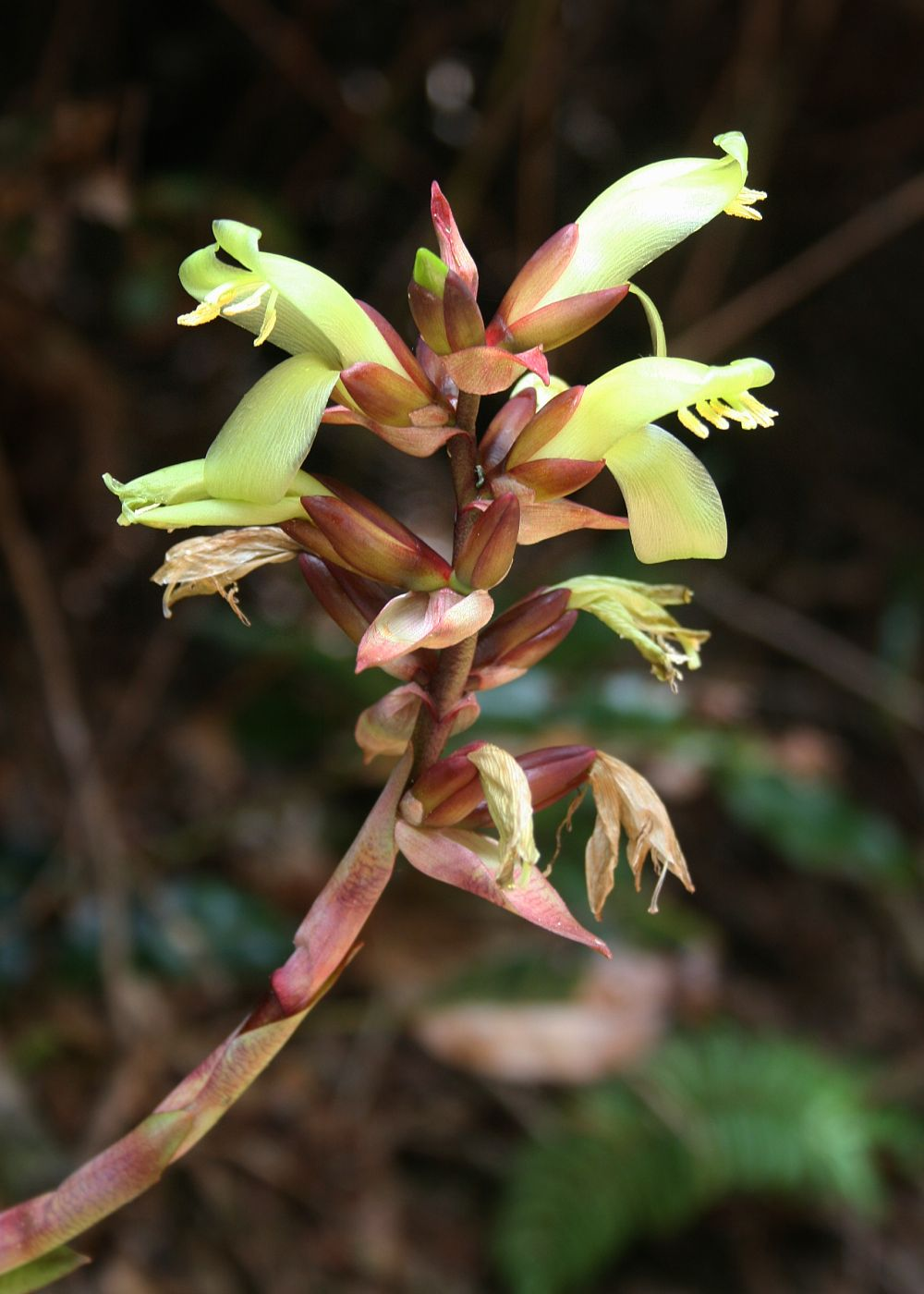 Vriesea williamsii (= Werauhia williamsii), Bromeliengewächse (Bromeliaceae) - Costa Rica: Prov. Alajuela, Parque Nacional Volcán Poás, 2550-2600 m